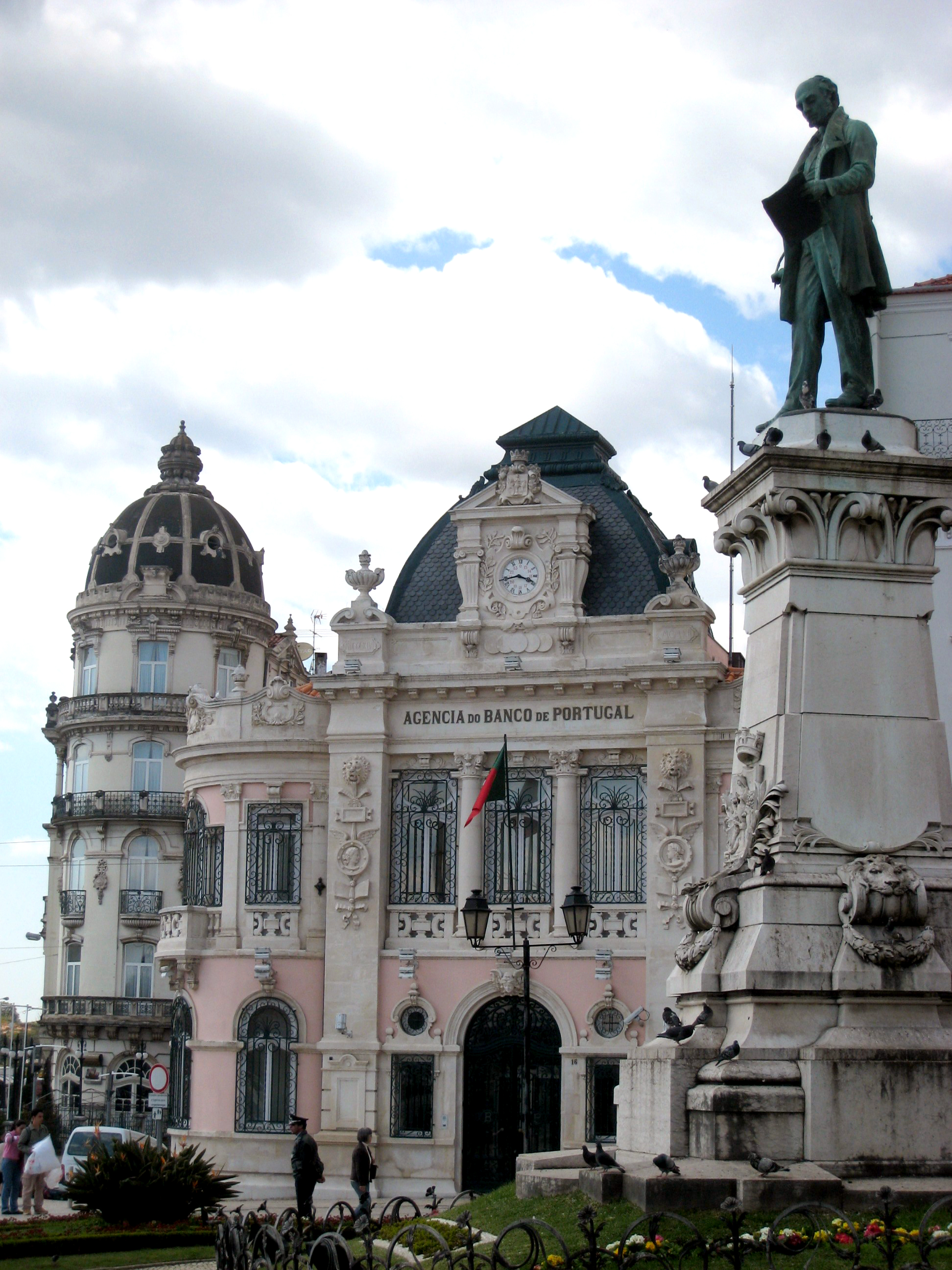 Largo da Portagem in Coimbra